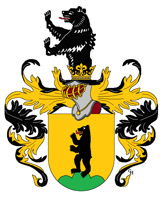 Wappen des k.u.k. Generalmajors Ignaz Verdroß (1851–1931), verliehen anlässlich seiner Erhebung in den österreichischen Adelsstand als "Edler von Droßberg" 1911. Zeichnung von Gerd Hruška ( Im Jahr 1921 verlieh ihm Kaiser Karl I. das Recht zum Gebrauch des österreichischen Freiherrenstandes. Für weitere Informationen zu dieser Standeserhebung siehe (